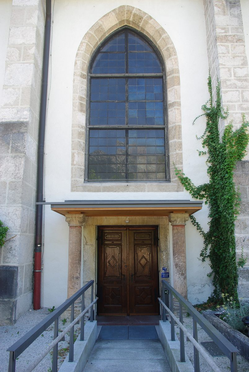 Nordportal (behindertengerecht) der Kirche St. Zeno in 83435 Bad Reichenhall